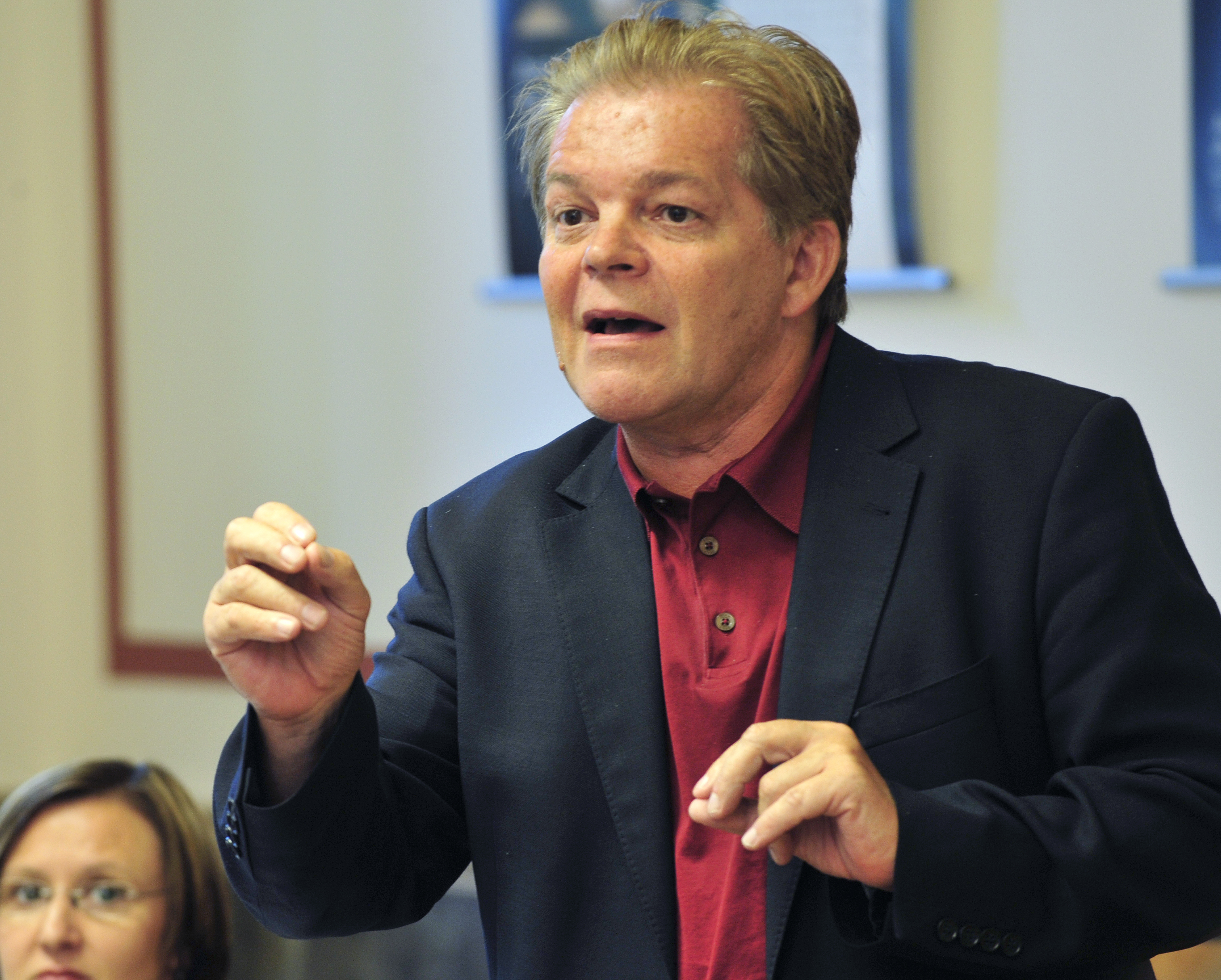 Johann Maier Enquete zum Thema "Mehr Gerechtigkeit für unsere arbeitenden Bäuerinnen und Bauern, Arbeit statt Hektar fördern" 16.09.2010 Foto: Johannes Zinner